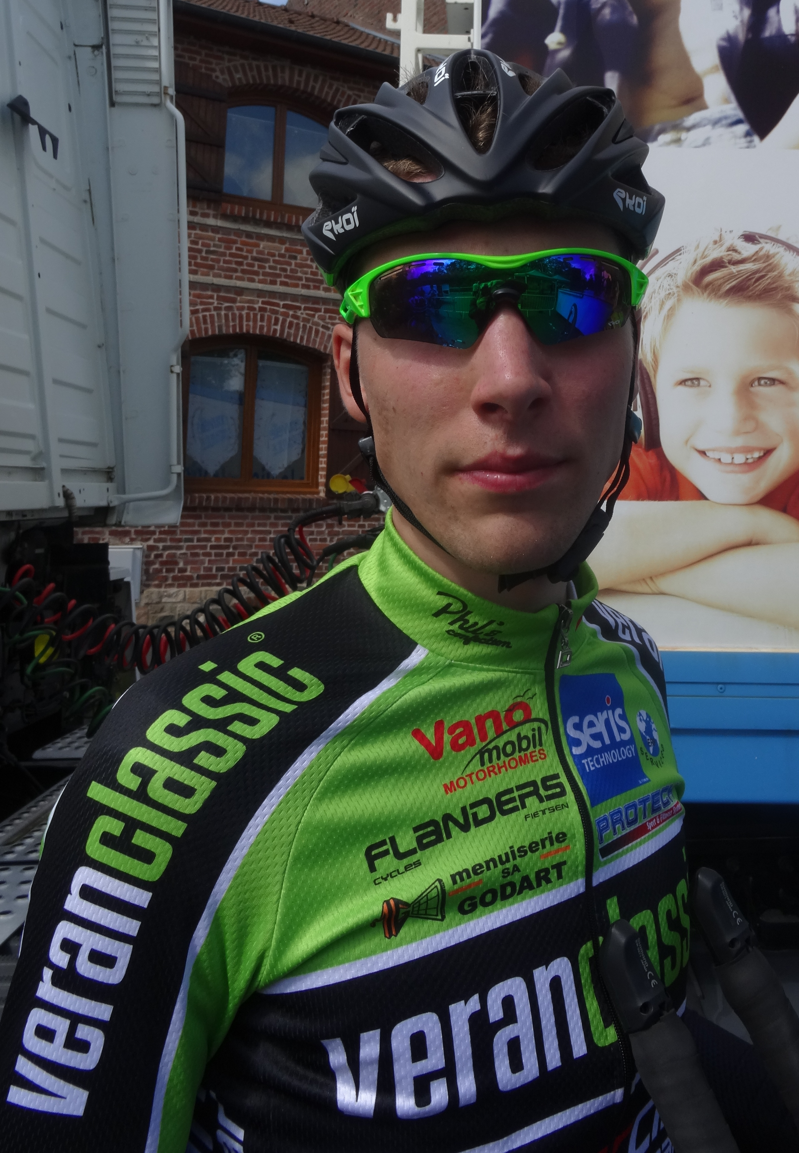 Reportage photographique réalisé le vendredi 23 mai 2014 à l'occasion du départ de la première étape du Paris-Arras Tour 2014 à Lens, Pas-de-Calais, Nord-Pas-de-Calais, France. Depicted person: Bob Schoonbroodt Depicted team: Veranclassic-Doltcini